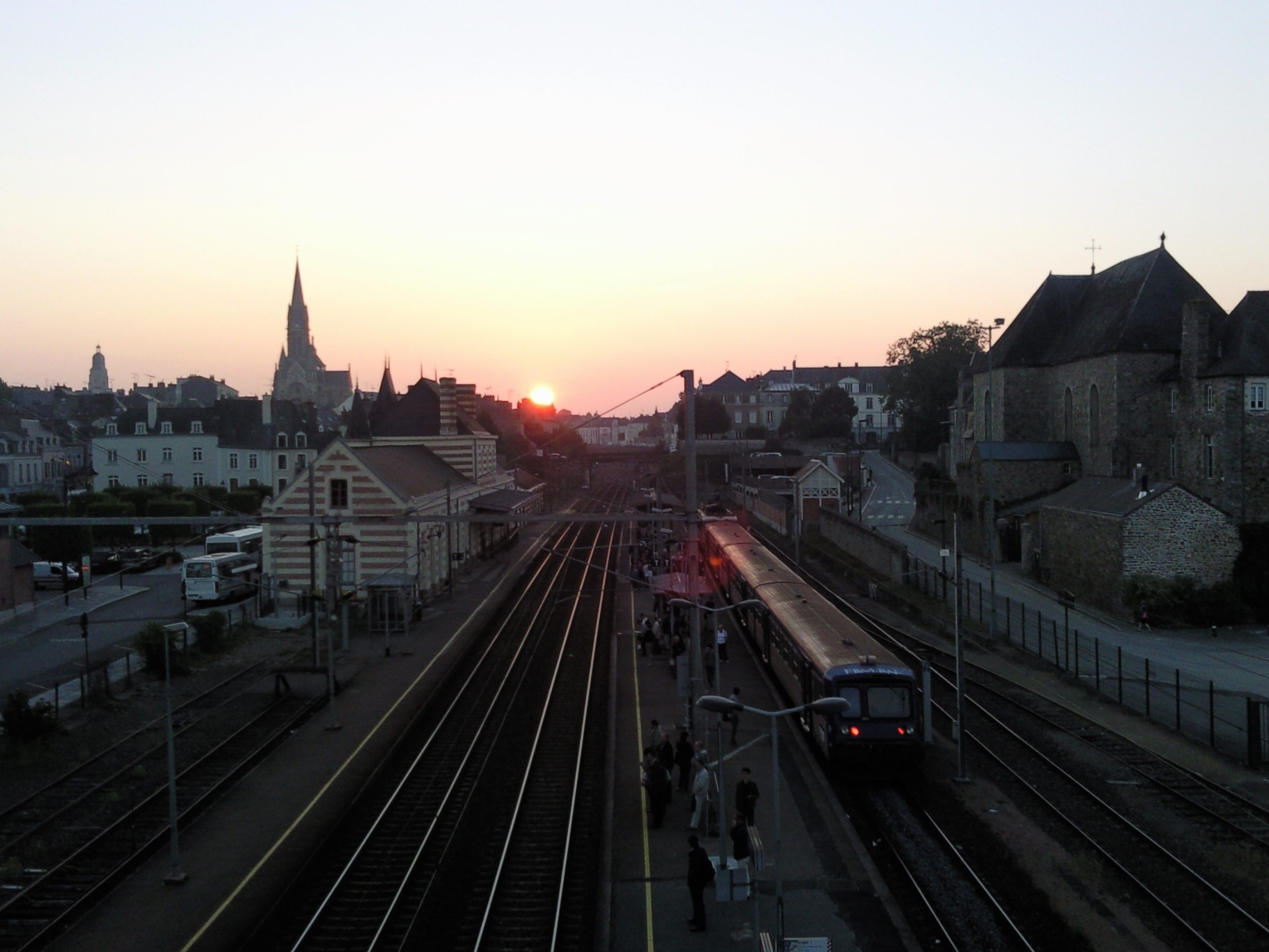 Le secteur de la gare de Vitré vue depuis la passerelle.